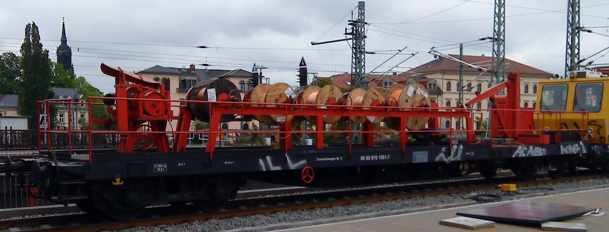 ehemaliger Flachwagen der Deutschen Reichsbahn der DDR mit Drehgestellen der Bauart Niesky, Handbremse abgebaut, stattdessen vom Boden bedienbare Feststellbremse nachgerüstet, Länge über Puffer nach Umbau 20100 mm, hier im Bauzugeinsatz als Trommelwagenn im Bahnhof Dresden-Neustadt